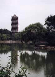 自制